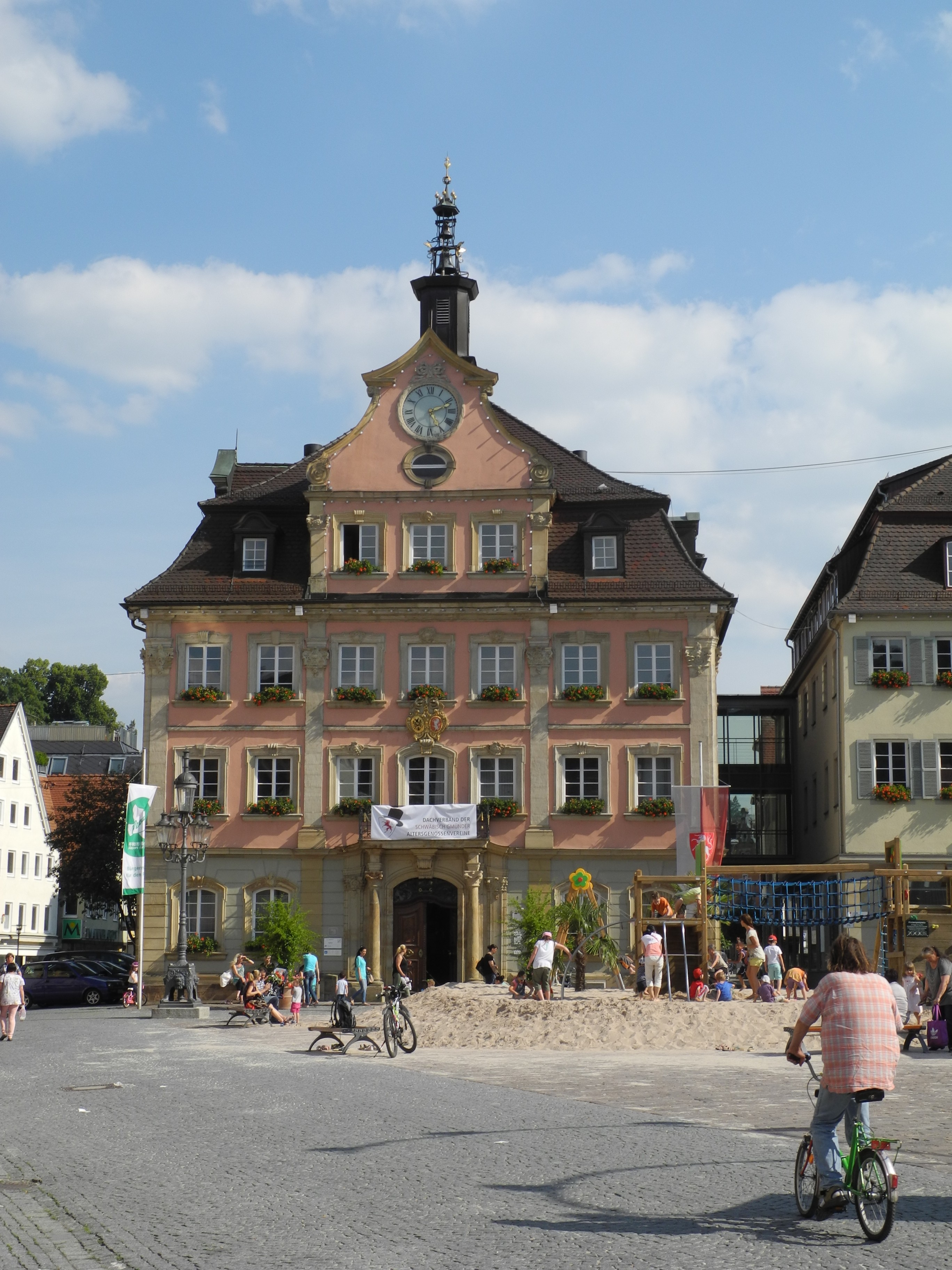 Schwäbisch Gmünd - Marktplatz mit Rathaus ab 1760